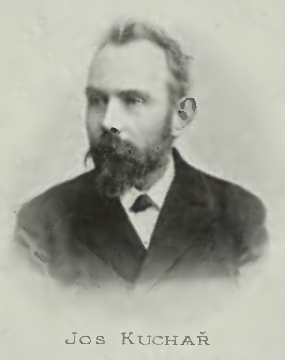 Portrét – Josef Kuchař (1847-1926), Český básník.